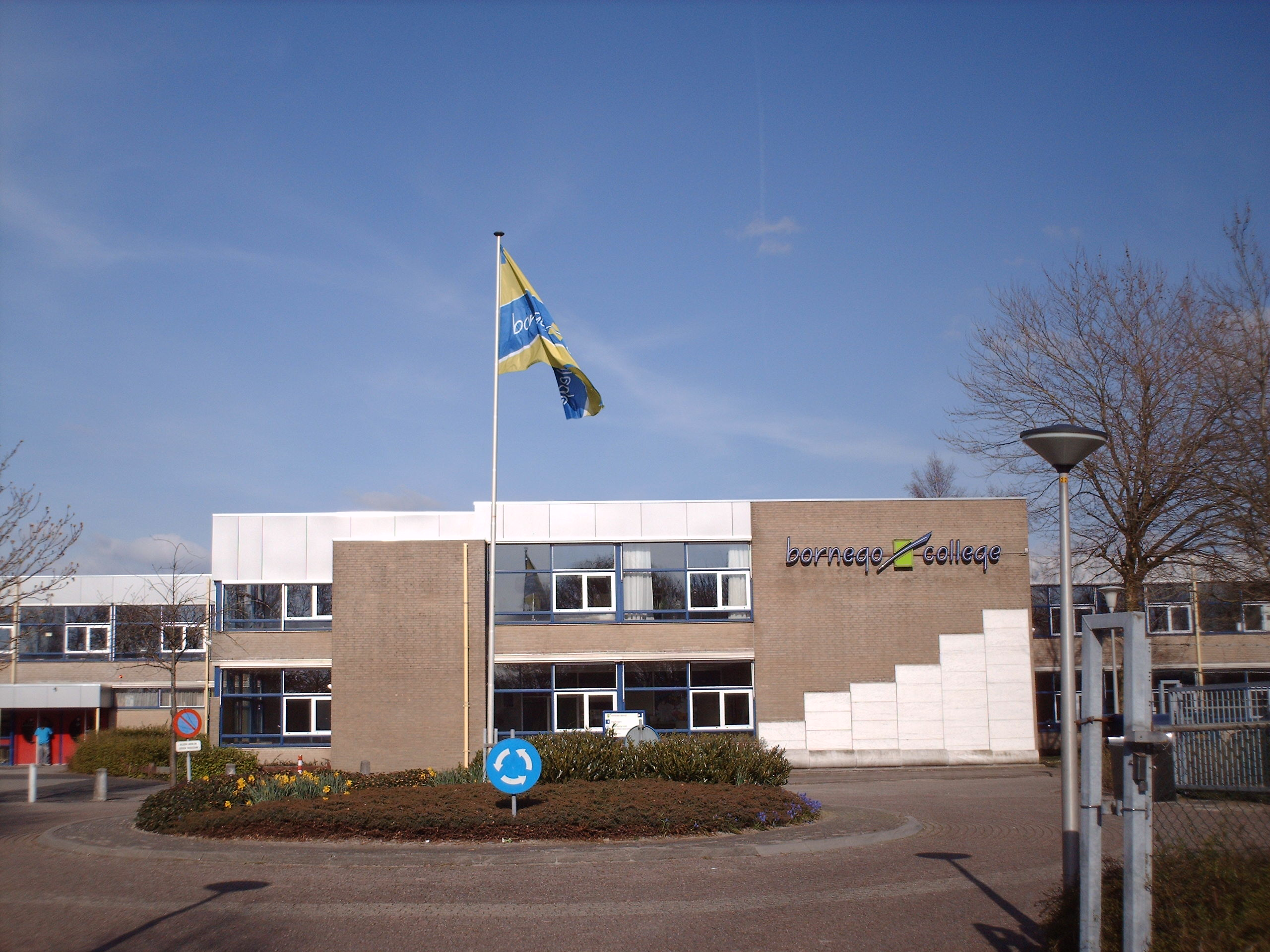 Bornego College Heerenveen